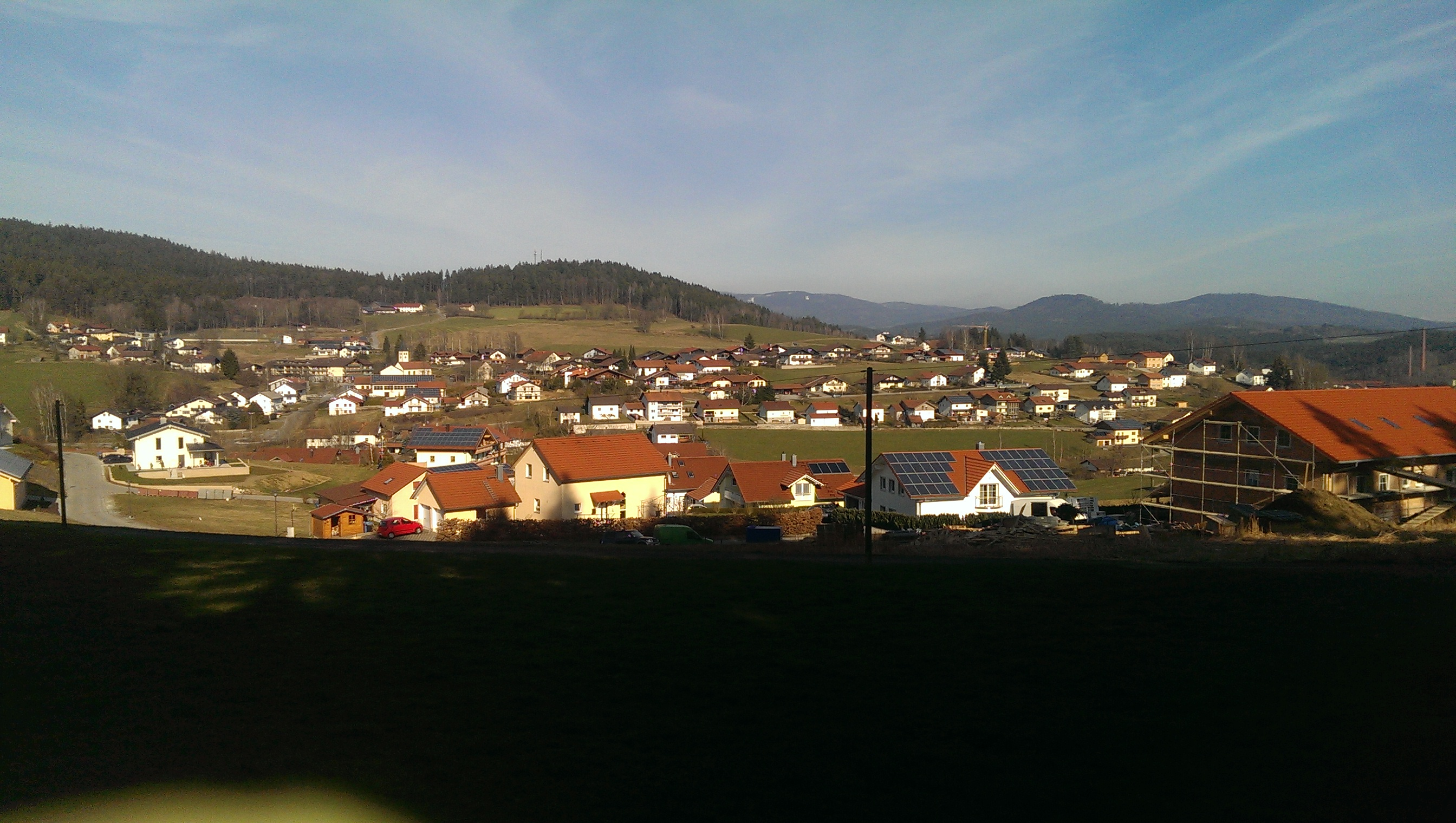 Geiersthal aus Westlicher Richtung. Im Hintergrund ist der Hochzellberg und am Fuße von diesem Bodenmais zu sehen.